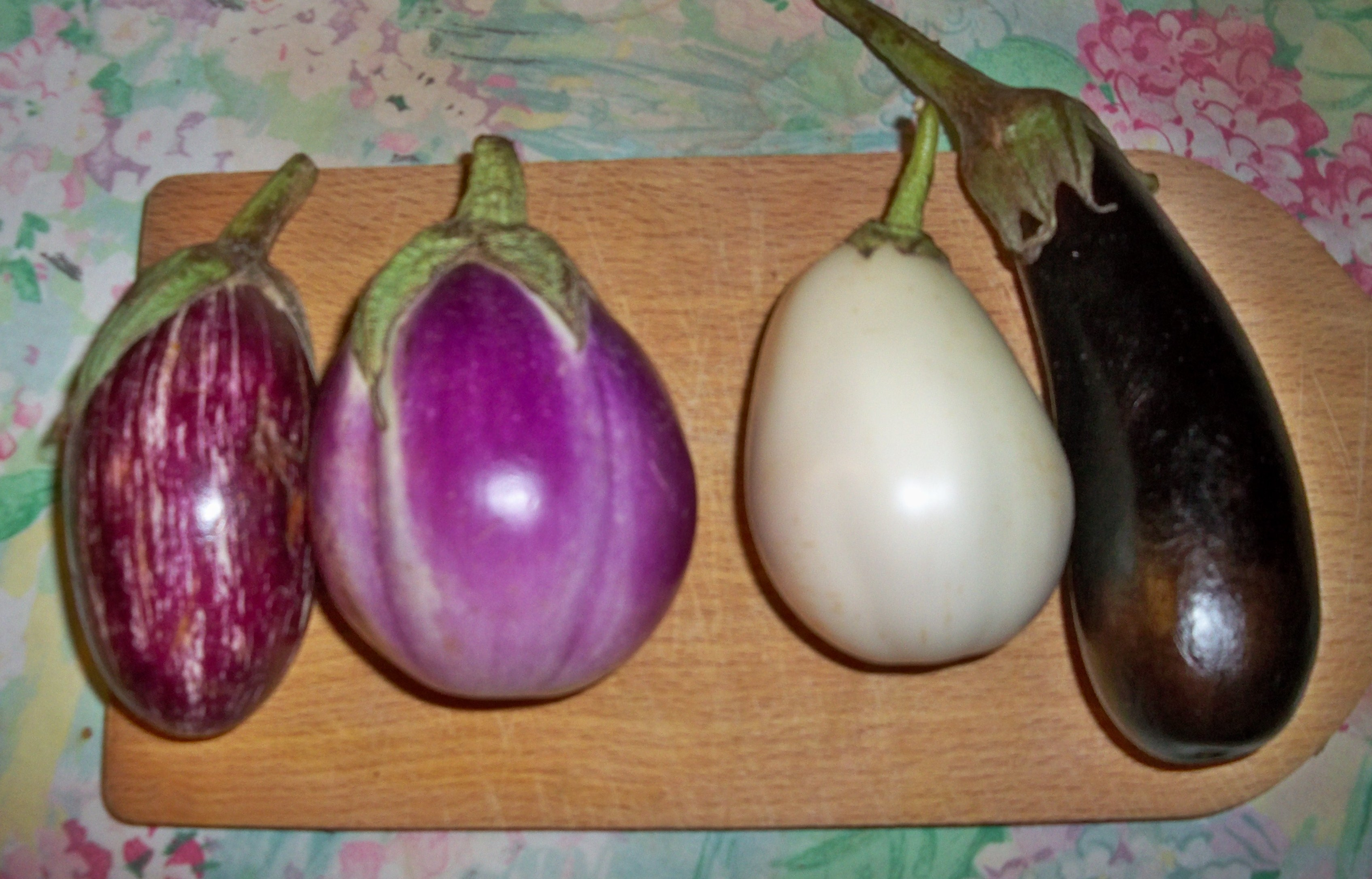 Variétés d'aubergines